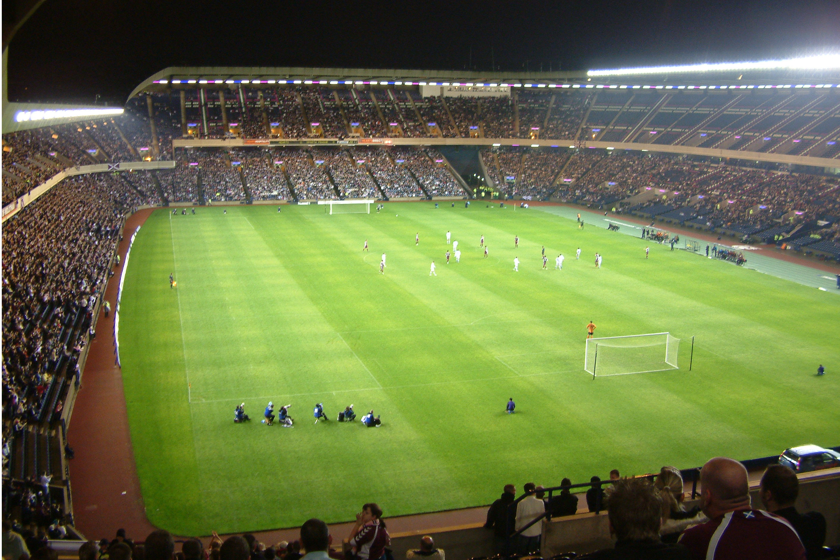 foto StaraBlazkova 2006